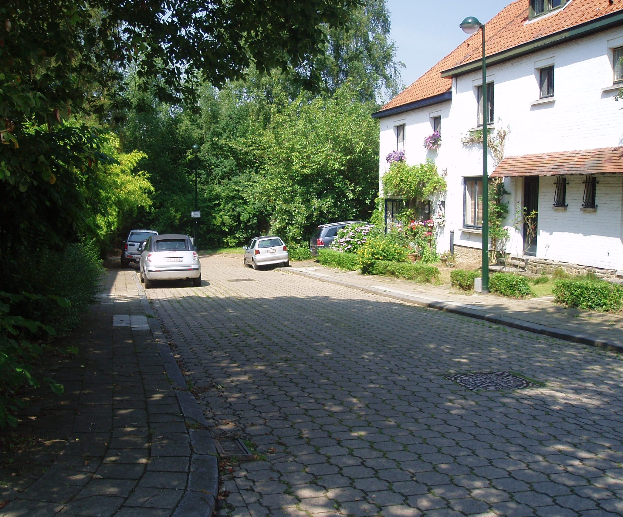 Rue Léopold Van Asbroeck Auderghem Belgium